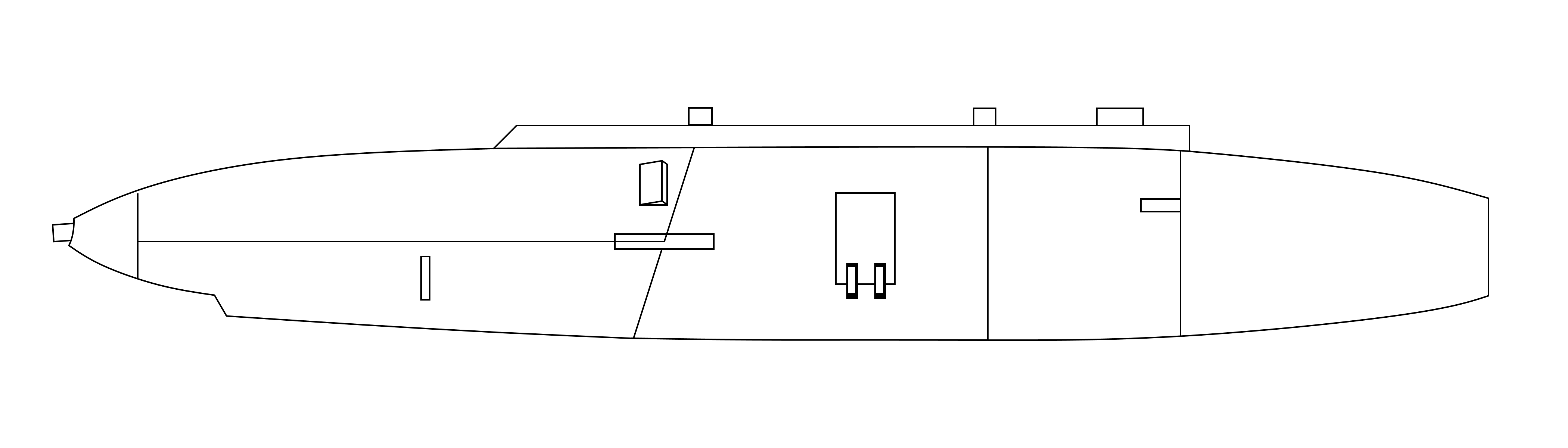 Ritning på en 30 mm akankapsel. Kapseln skapades för SK 60B och Saab 37 projekten av Försvarets Fabriksverk och höll en 30 mm akan m/55 automatkanon för attackuppdrag.